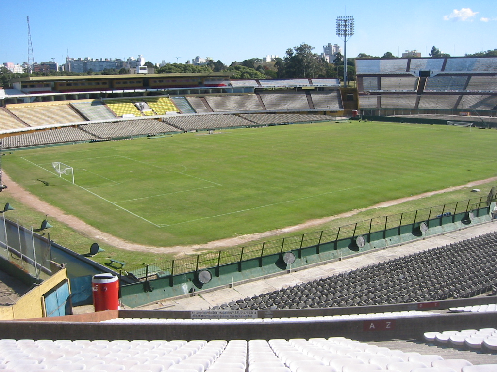 Stadion Estadio Centenario in Montevideo